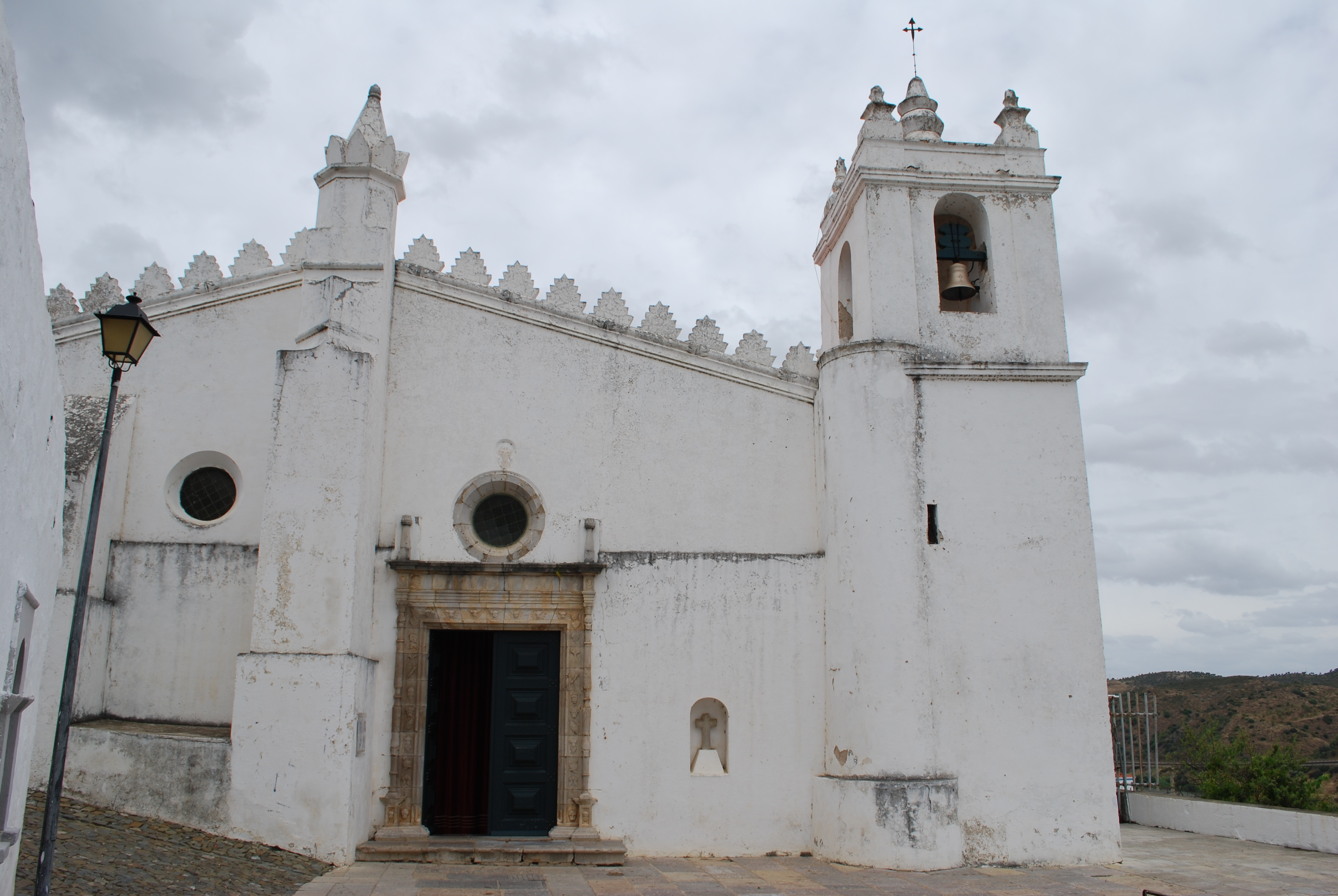 Igreja de Nossa Senhora da Anunciação ou Igreja Matriz de Mértola